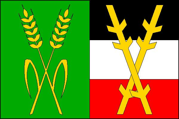 Vlajka obce Úhřetice. List tvoří zelený žerďový pruh, široký polovinu délky listu, a tři vodorovné pruhy, černý, bílý a červený. V žerďové polovině listu zkřížené žluté obilné klasy s listem, ve vlající polovině listu zkřížené žluté ostrve. Poměr šířky k délce listu je 2:3.